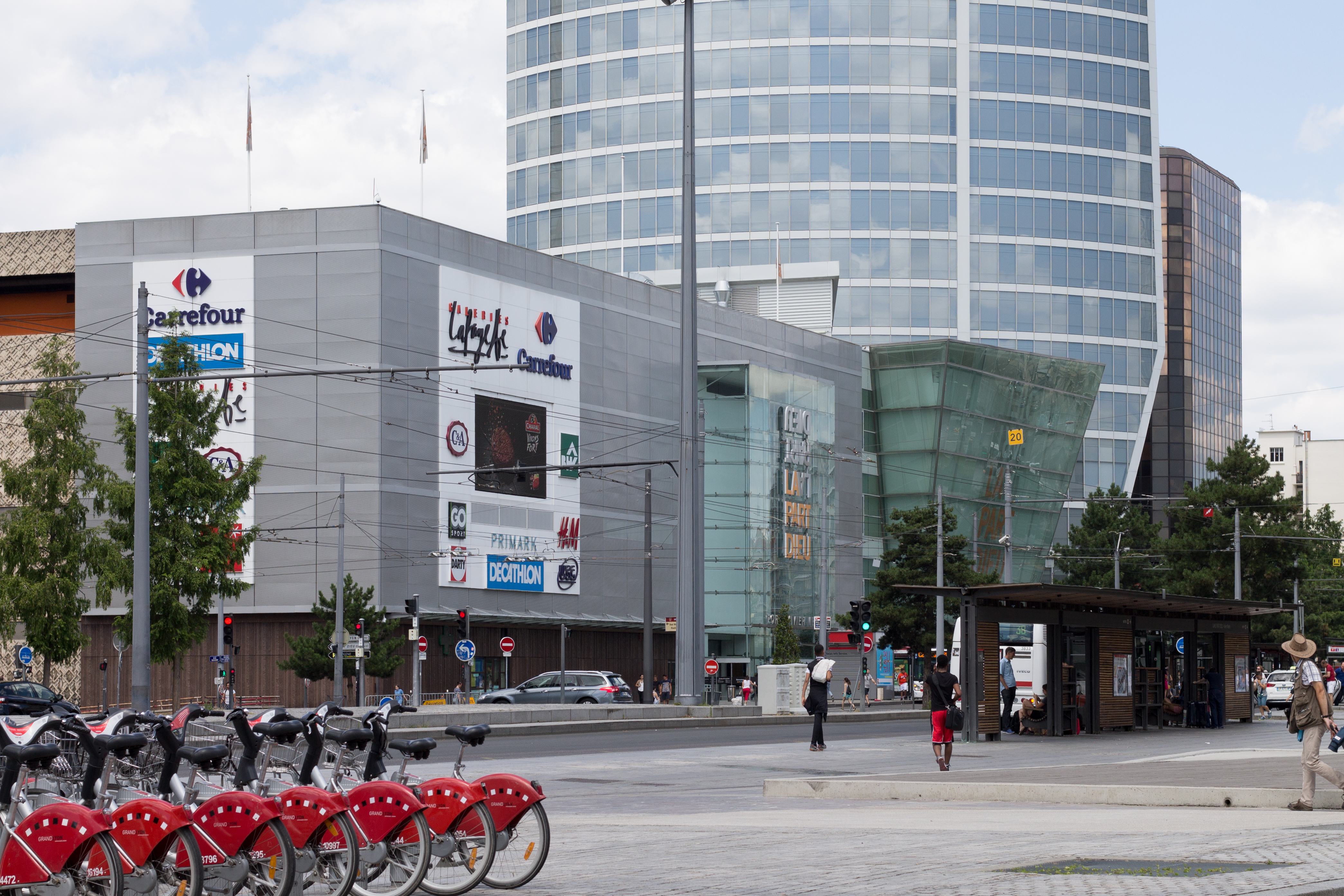 Façade du centre commercial de La Part Dieu